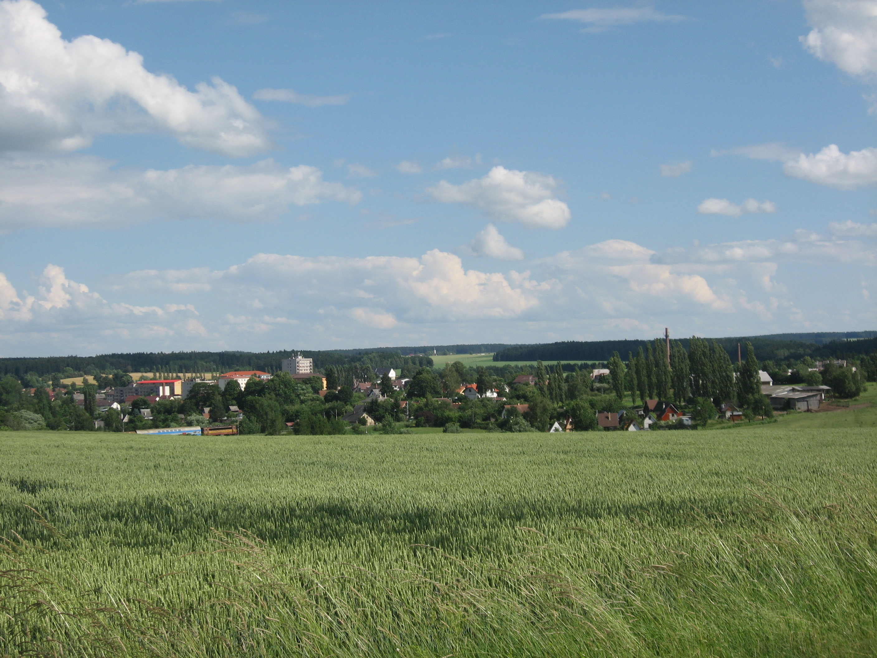 Dobronín, pohled na obec ze silnice od Kamenné